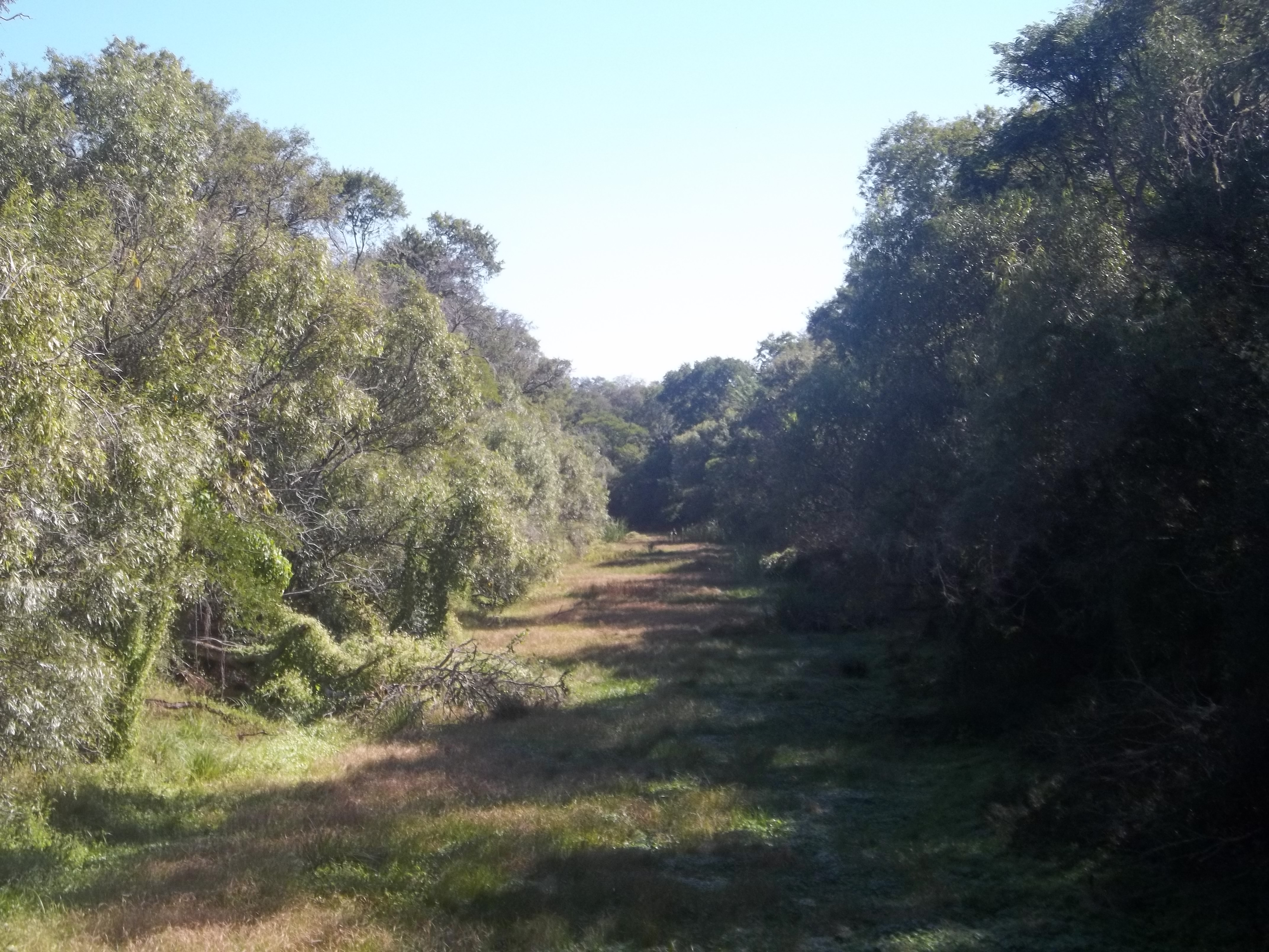 Vista del río Negro hacia el este en el puente colgante del Parque Nacional Chaco, Argentina.